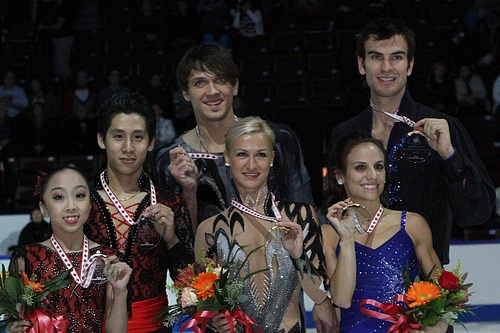 Подиум в парном катании на 2011 Skate Canada International. Слева на право: Суй Вэньцзин / Хань Цун, Татьяна Волосожар / Максим Траньков, Мэган Дюамель / Эрик Рэдфорд